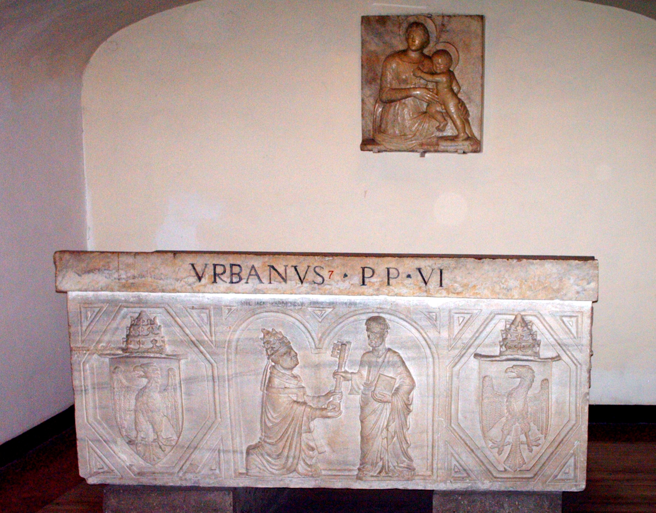 Tomb of pope Urbanus VI, "grotte vaticane", Basilica di San Pietro